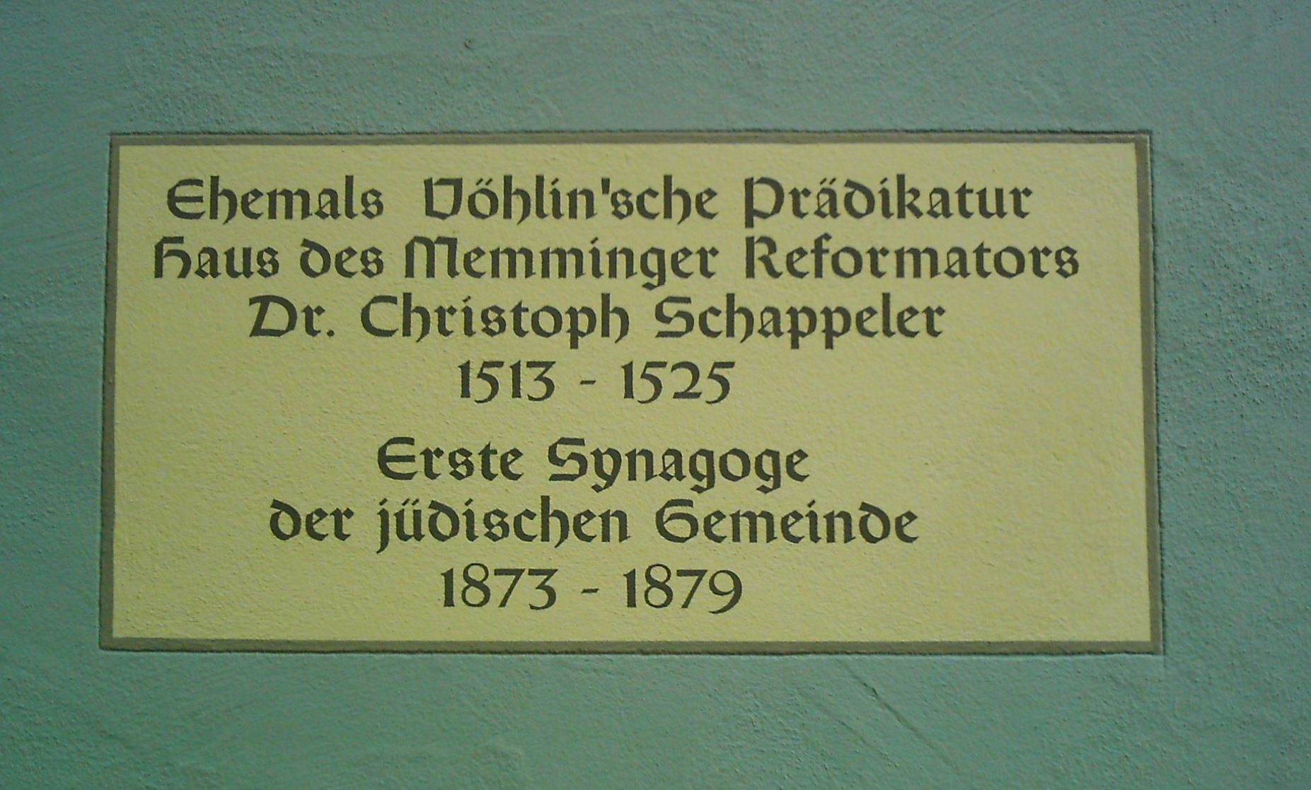 Ehemalige Synagoge Memmingen